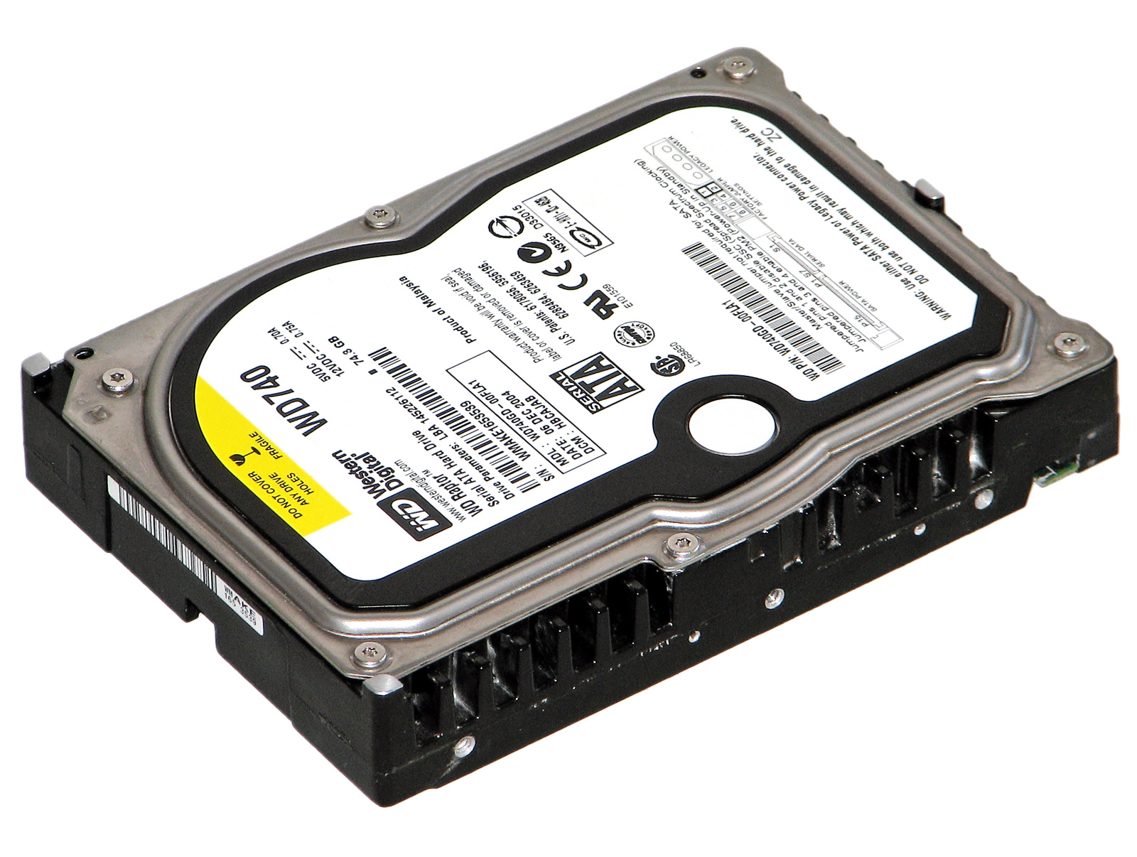 Dieses Bild zeigt eine SATA-Festplatte (Western Digital WD740 - 10.000 U/Min - 74 GB).